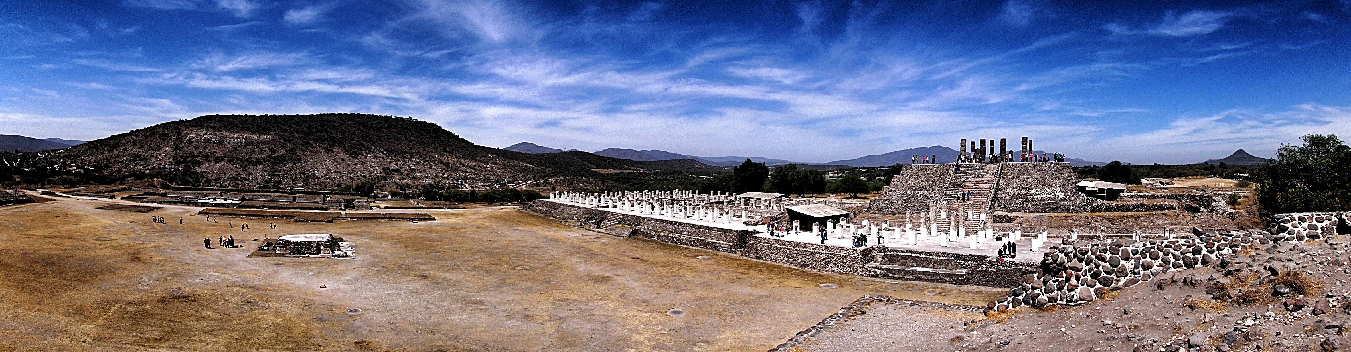 Vista panorámica de la Zona Arqueológica de Tula, Hidalgo